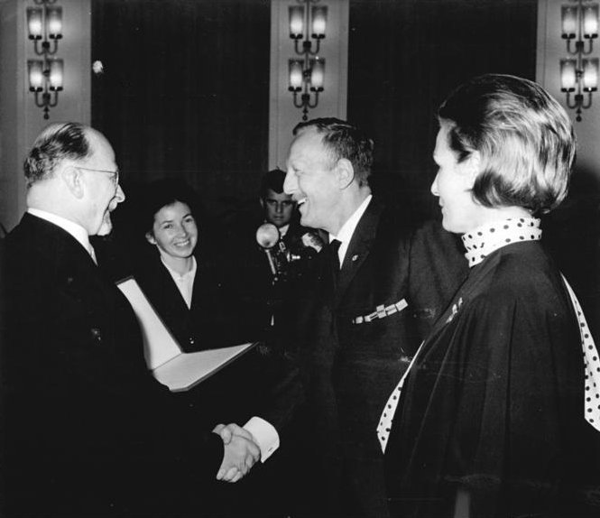 Zentralbild-Junge-Sturm - 6.10.1961 Walter Ulbricht verlieh Nationalpreis 1961. Den Nationalpreis 1961 verlieh der Vorsitzende des Staatsrates der Deutschen Demokratischen Republik, Walter Ulbricht, am Vorabend des 12. Jahrestages der Gründung der DDR 46 hervorragenden Persönlichkeiten und Kollektiven aus allen Gebieten des gesellschaftlichen Lebens. Auf einem festlichen Auszeichnungsakt am Vormittag des 6.10.1961 im Amtssitz des Staatsrates in Berlin-Niederschönhausen nahmen die Männer und Frauen, die sich durch großartige Leistungen zum Nutzen der Republik höchste Anerkennung erworben haben, aus der Hand Walter Ulbrichts den Nationalpreis entgegen. UBz. Walter Ulbricht (links) zeichnet Erwin Geschonnek und Inge Keller vom Kollektiv des Fernsehfilmwerks "Gewissen in Aufruhr" mit dem Nationalpreis I. Klasse für Kunst und Literatur aus.